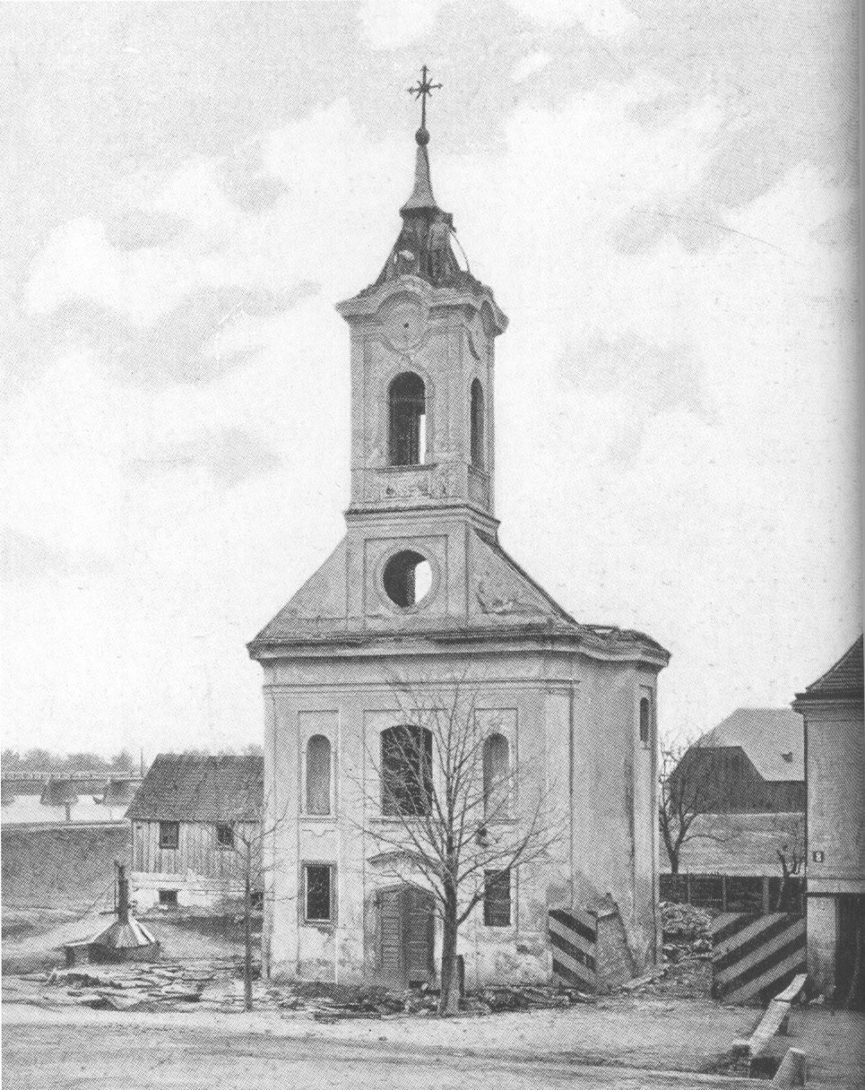 Zwischenbrücken (Vienna), Johannes Nepomuk Kapelle during demolation 1872